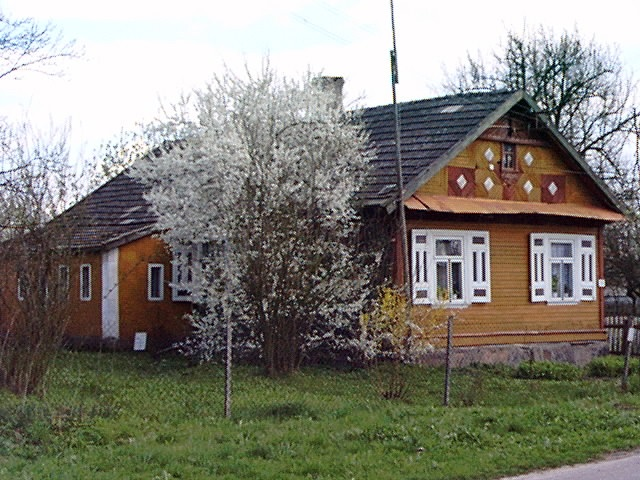 Kuraszewo